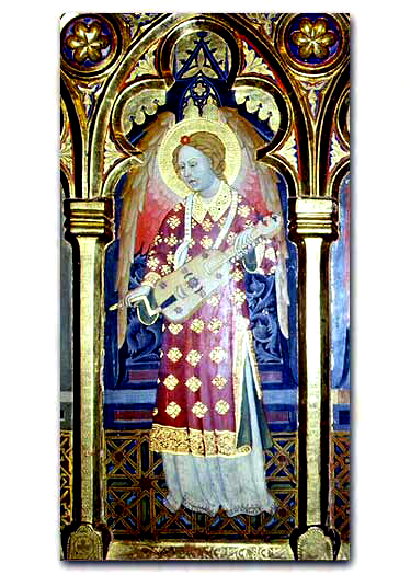 Organistrum del Tríptico del Monasterio de Piedra, Zaragoza (España) siglo XIV.